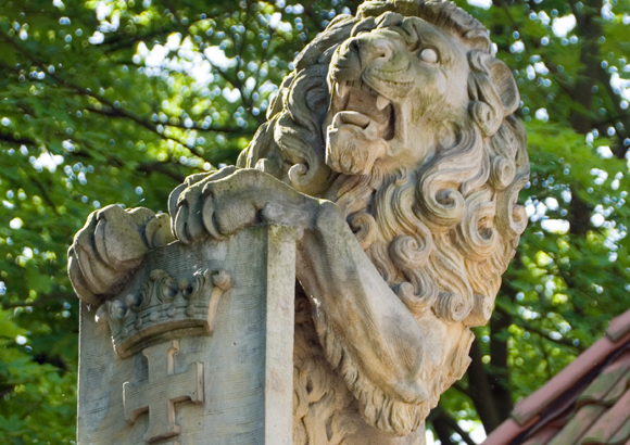 Figura lwa przy bramie głównej